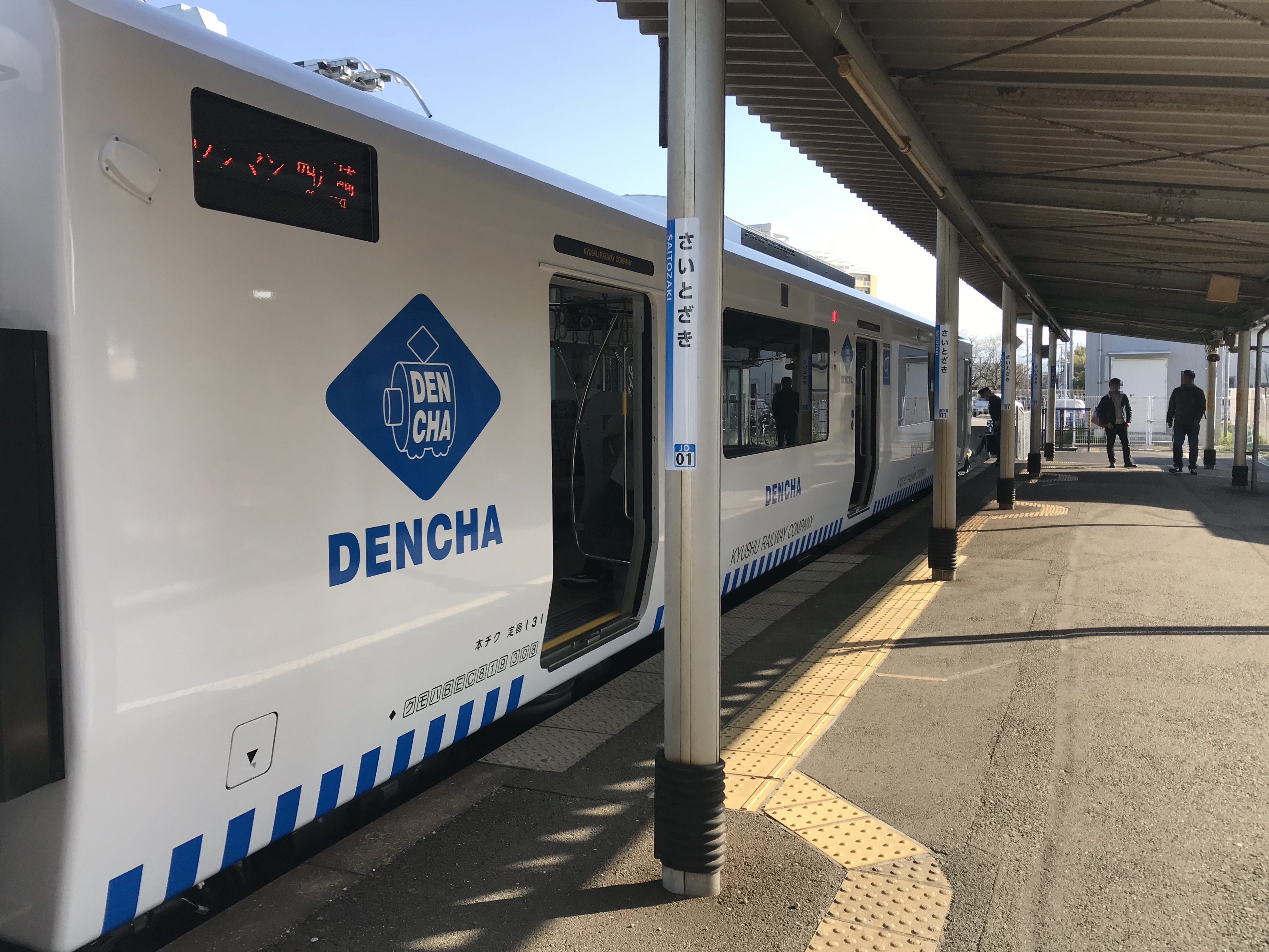 西戸崎駅のホームと香椎線列車